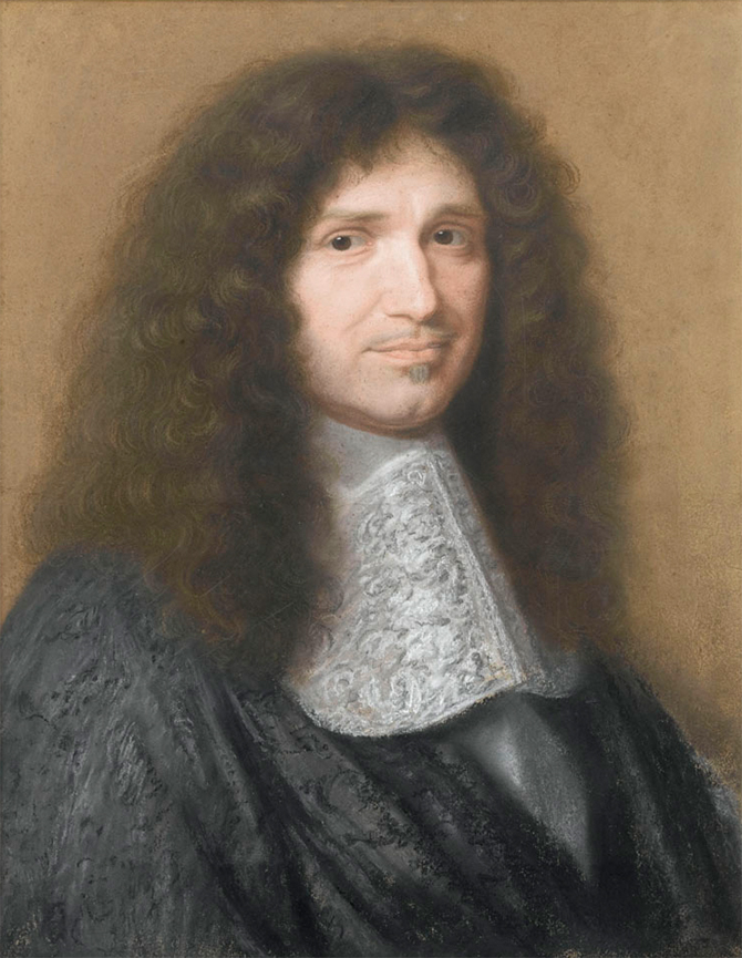 Portrait de Jean-Baptiste Colbert (1619-1683)